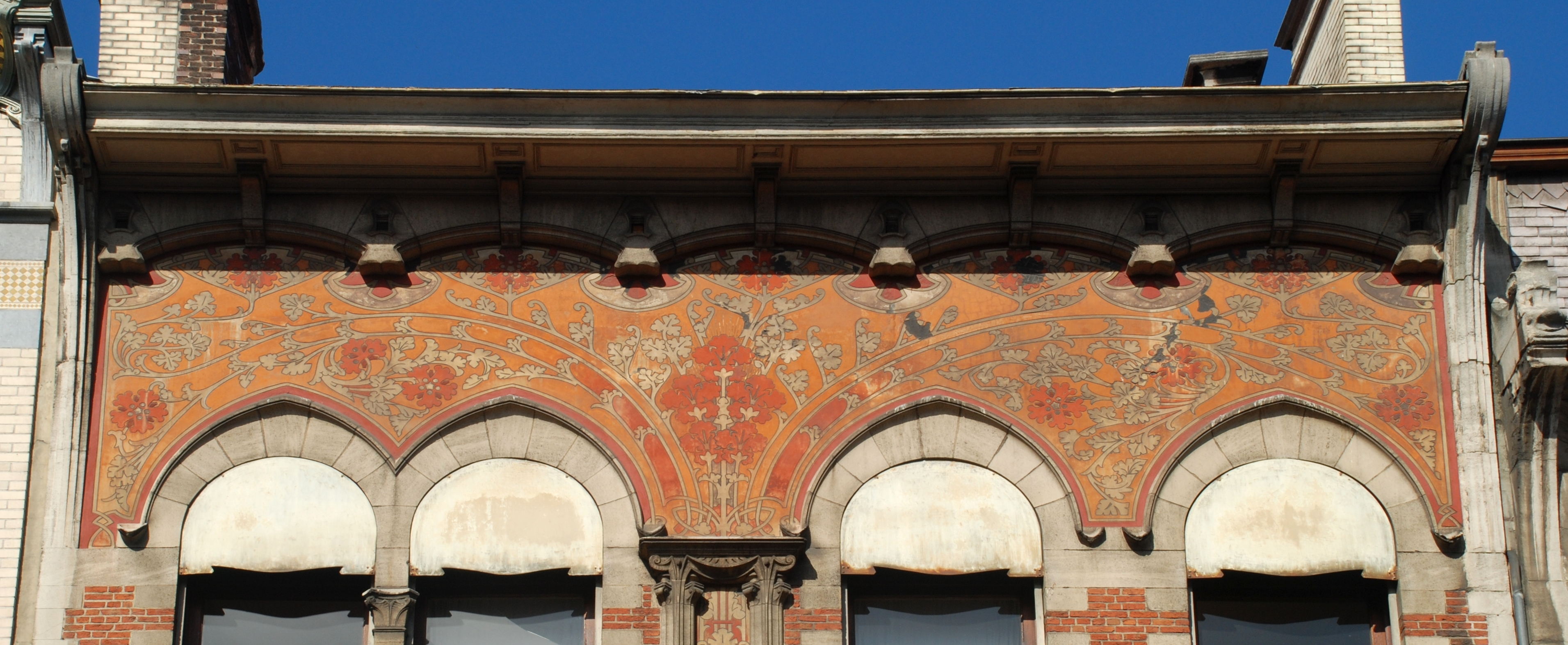 Belgique - Bruxelles - Maison Henri Jacobs